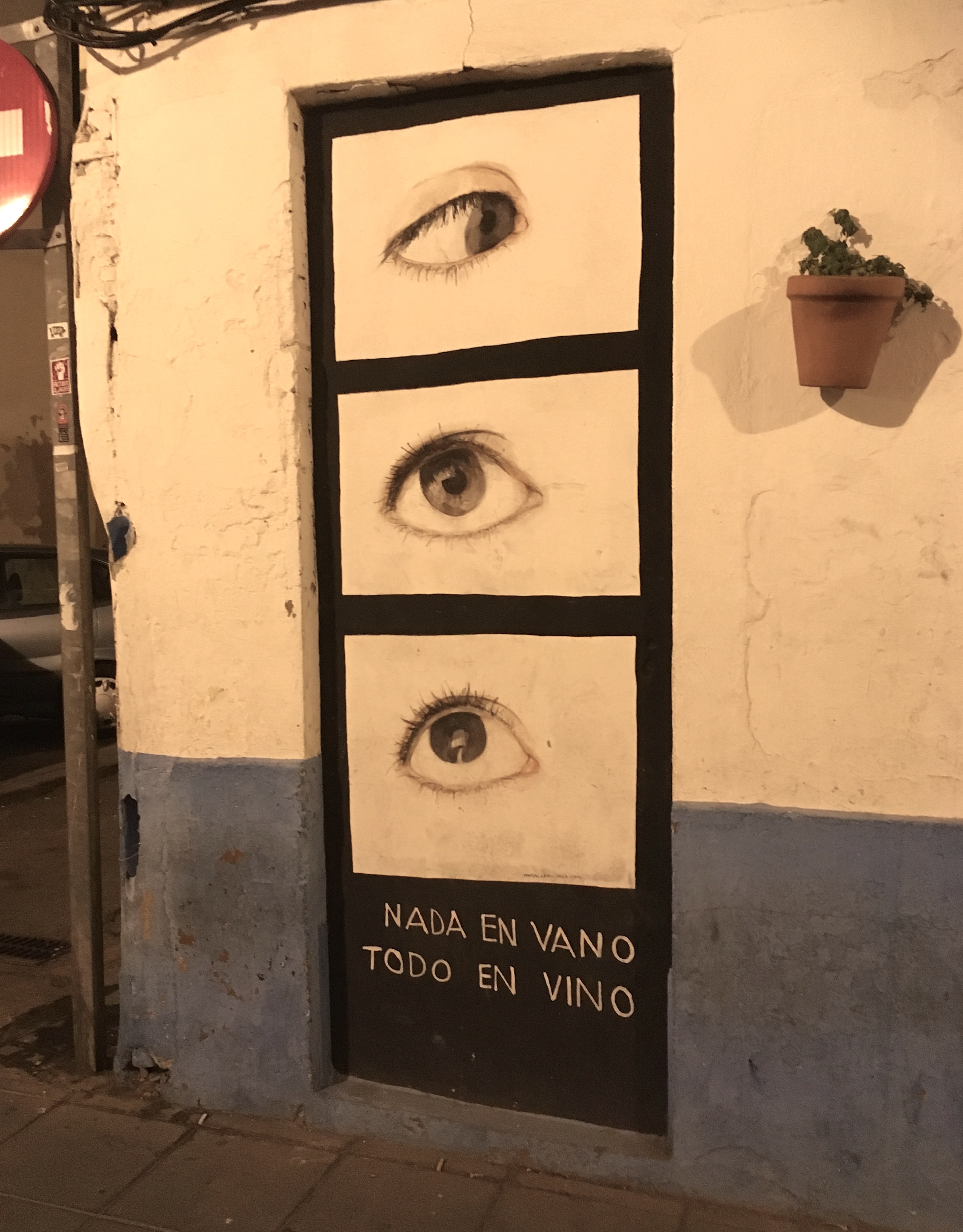 Grafiti en el Cabanyal-Canyamelar, el barrio marinero de Valencia."Nada en vano, todo en vino".